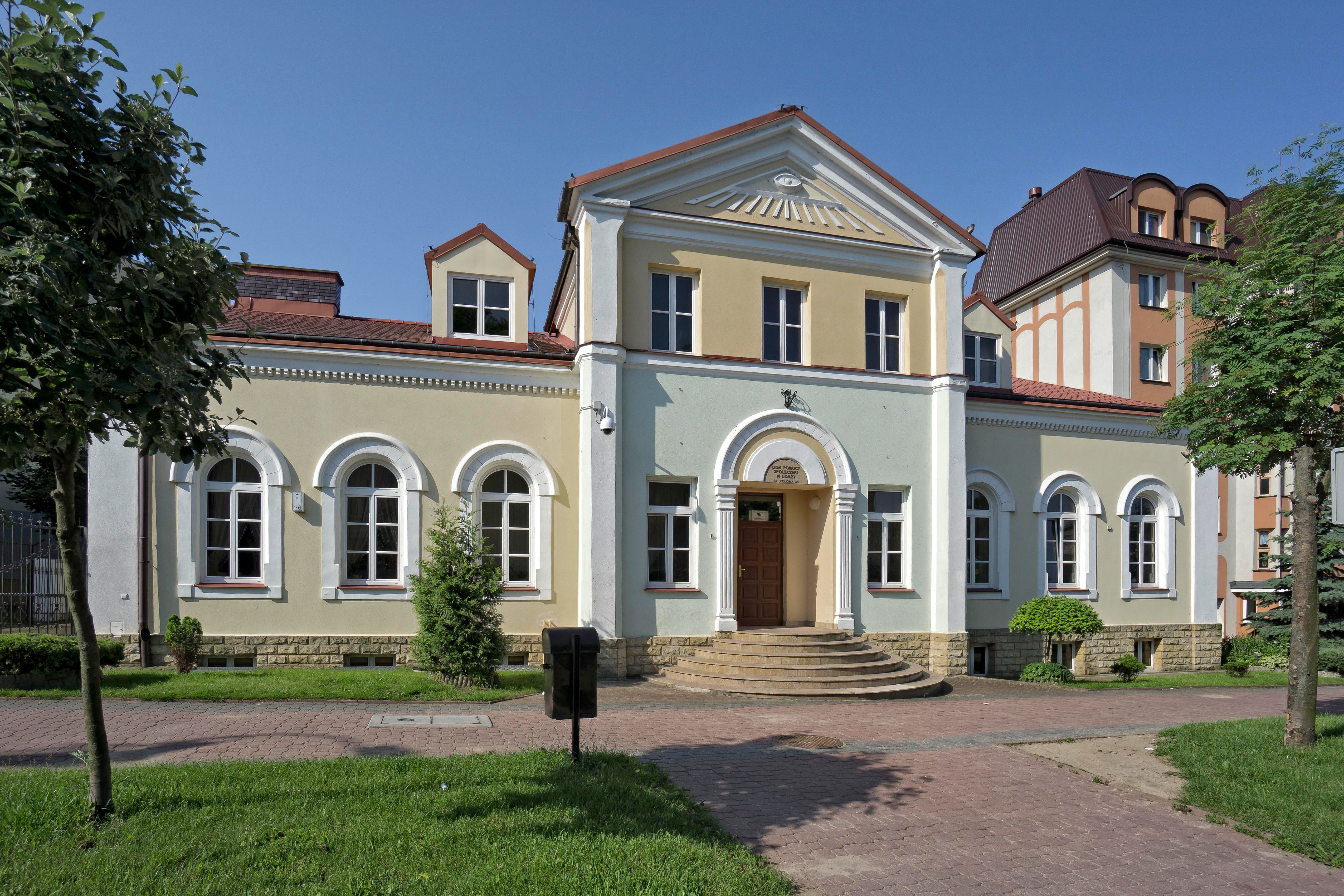 Dom Pomocy Społecznej w Łomży przy ulicy Polowej 39